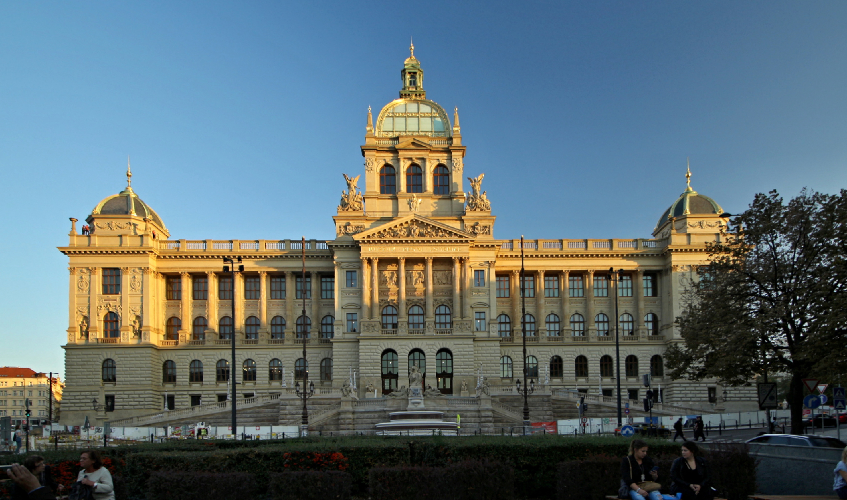 Národní muzeum v Praze